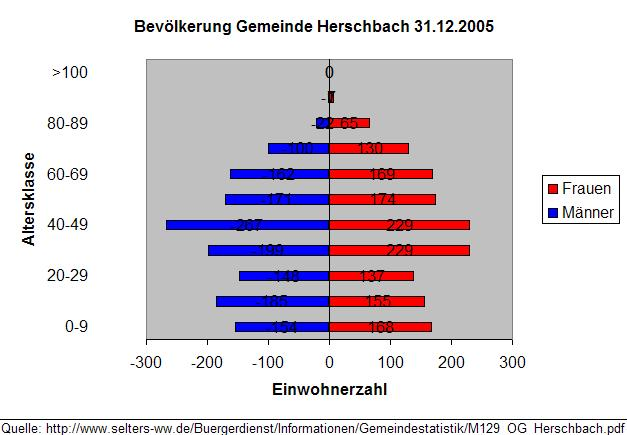 Bevölkerungsverteilung in Herschbach Dez. 2005